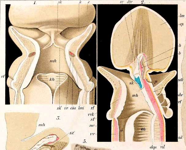 b centraler Blutraum (Fig. 2). div Eicheldarm (Fig. 2). ep Epidermis (Fig. 2). f dorsale Falte der Kragenpforte h Herzblase (Fig. 2). kh Kiemendarmhöhle (Fig. 1,2,10). Im Längsmusculatur der Eichel (Fig. 2), mh Mundhöhle, Pharynx (Fig. 1, 2, 3, 25). nd dorsaler Nervenstamm i'Fig. 2, 10, 13, 19, 20). ndk Kragenmark (Fig. 2, 25). nv ventraler Nervenstamm (Fig. 2, 10, 13). Oesophagus (Fg. 2, 10, 12, 13, 15). Eichelporus (Fig. 2). rf Ringfurche d. Kragens (Fg. 1,2). sk Eichelskelet (Fig. 1,2). sv ventrales Eichelseptum (Fig. 2). vd dorsaler Gefässtamm (Fig. 2, 10, 13, 19, 20). vv ventraler Gefässtamm (Fig. 2, 10, 13). vvk ventrales Längsgefäss des Kragens (Fig. 2, 25).